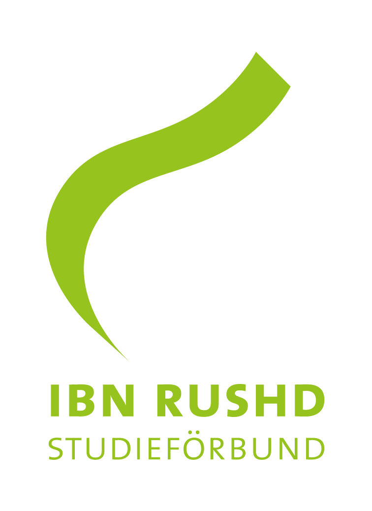 Ibn Rushds logotyp